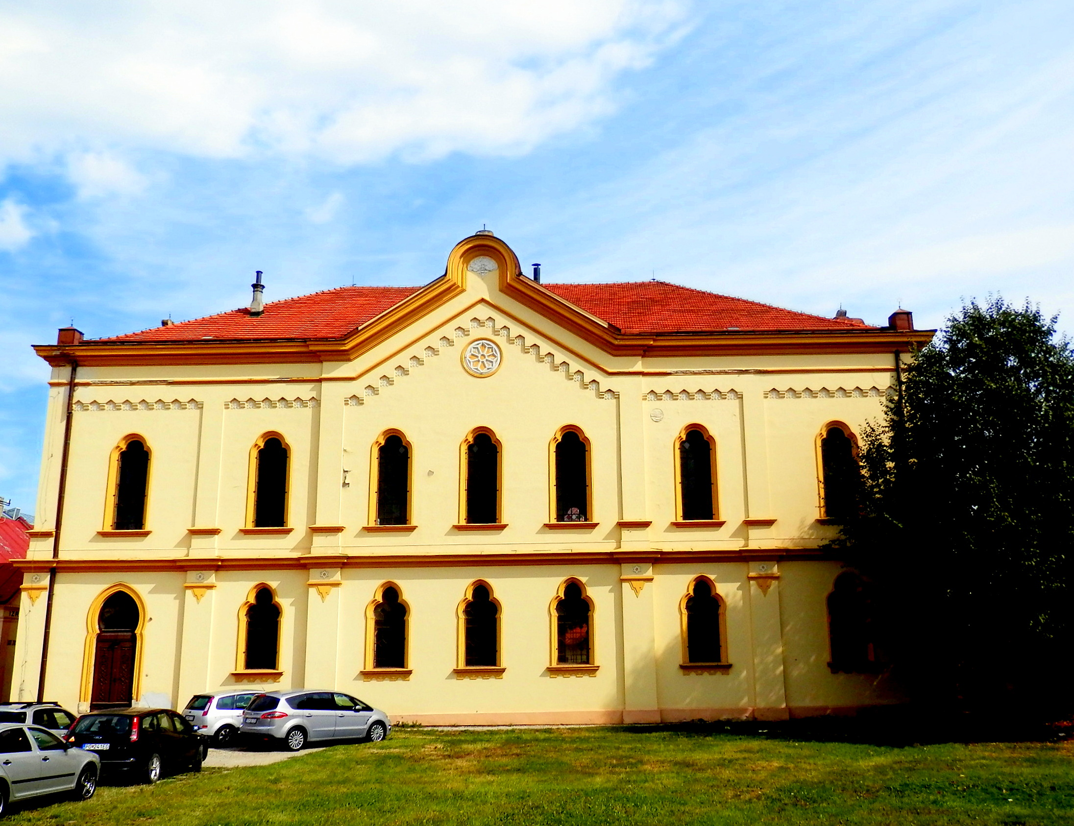 Ortodoxná synagóga bola postavená v roku 1898. Stavba sa dodnes využíva ako modlitebňa. Na ženskej galérii je inštalovaná tzv. Barkányova zbierka judaík – expozícia Múzea židovskej kultúry. Pohľad z juhu. Mesto Prešov